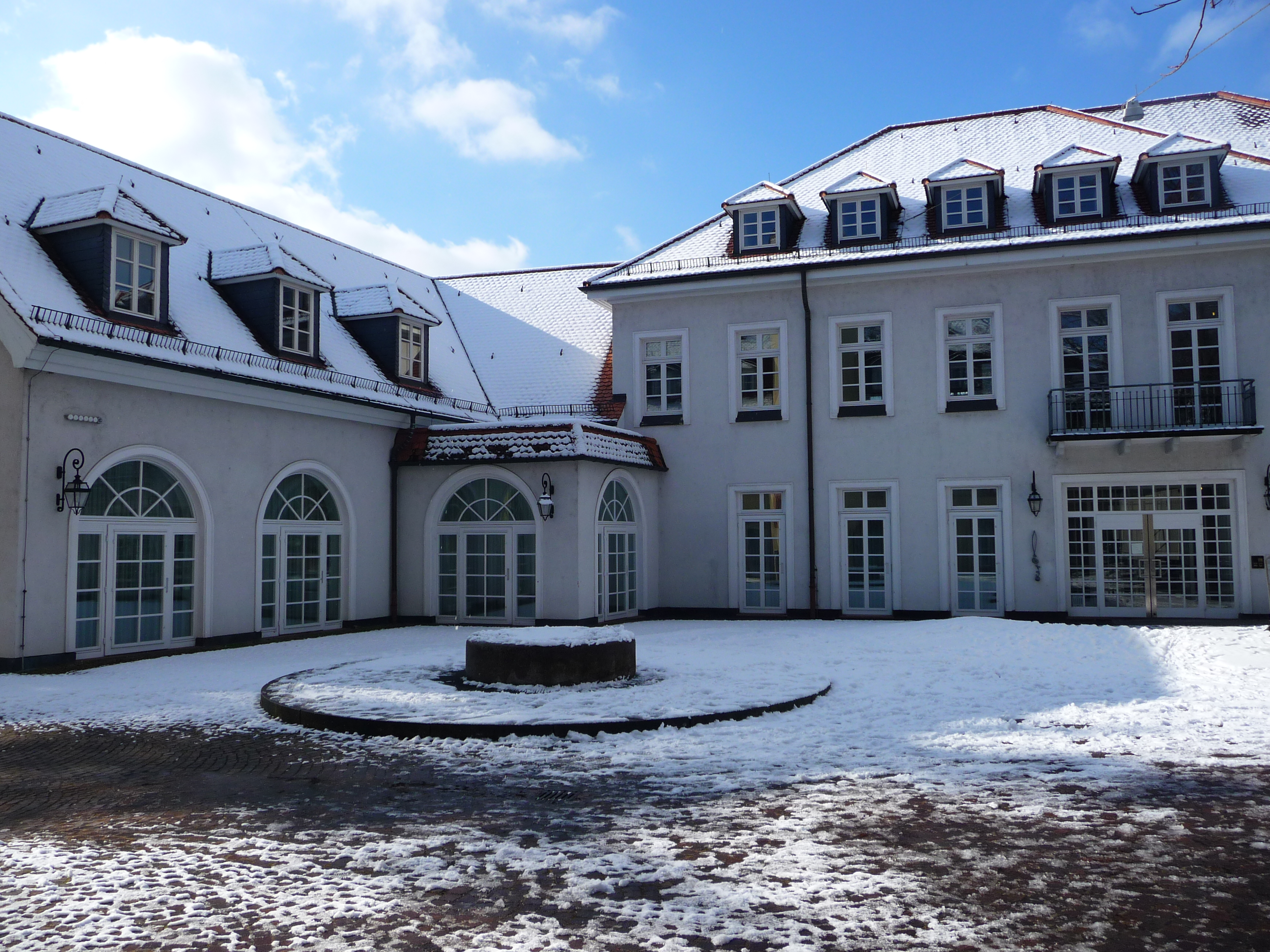 Carl-Rottmann-Gebäude in Heidelberg-Handschuhsheim (Deutschland)